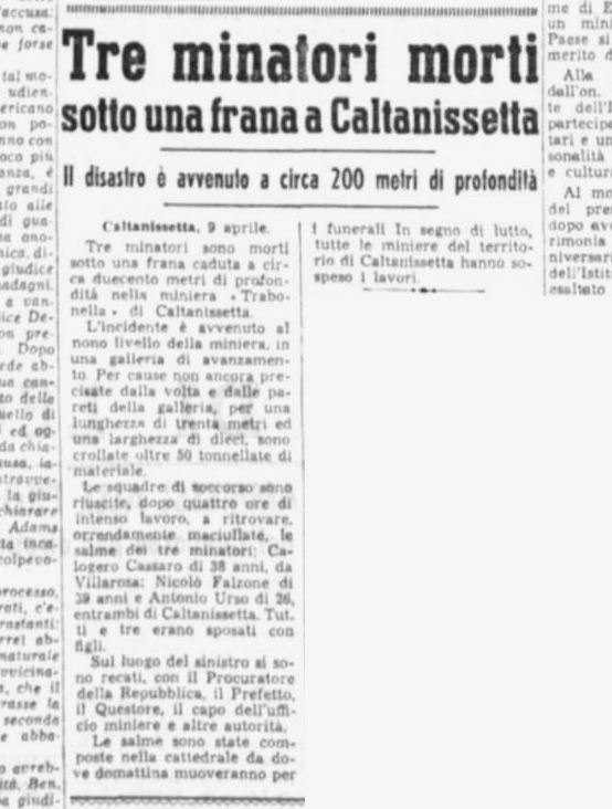 Giornale di Sicilia pagina del disastro della miniera Trabonella